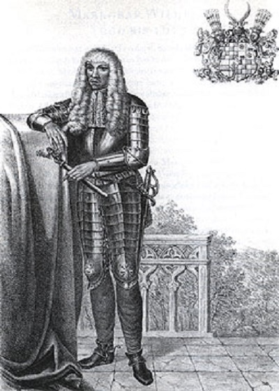 Markgraf Eduard Fortunat von Baden (* 17. September 1565 in London; † 18. Juni 1600 in der Burg Kastellaun/Hunsrück) war von 1588 bis 1600 Regent der Markgrafschaft Baden.